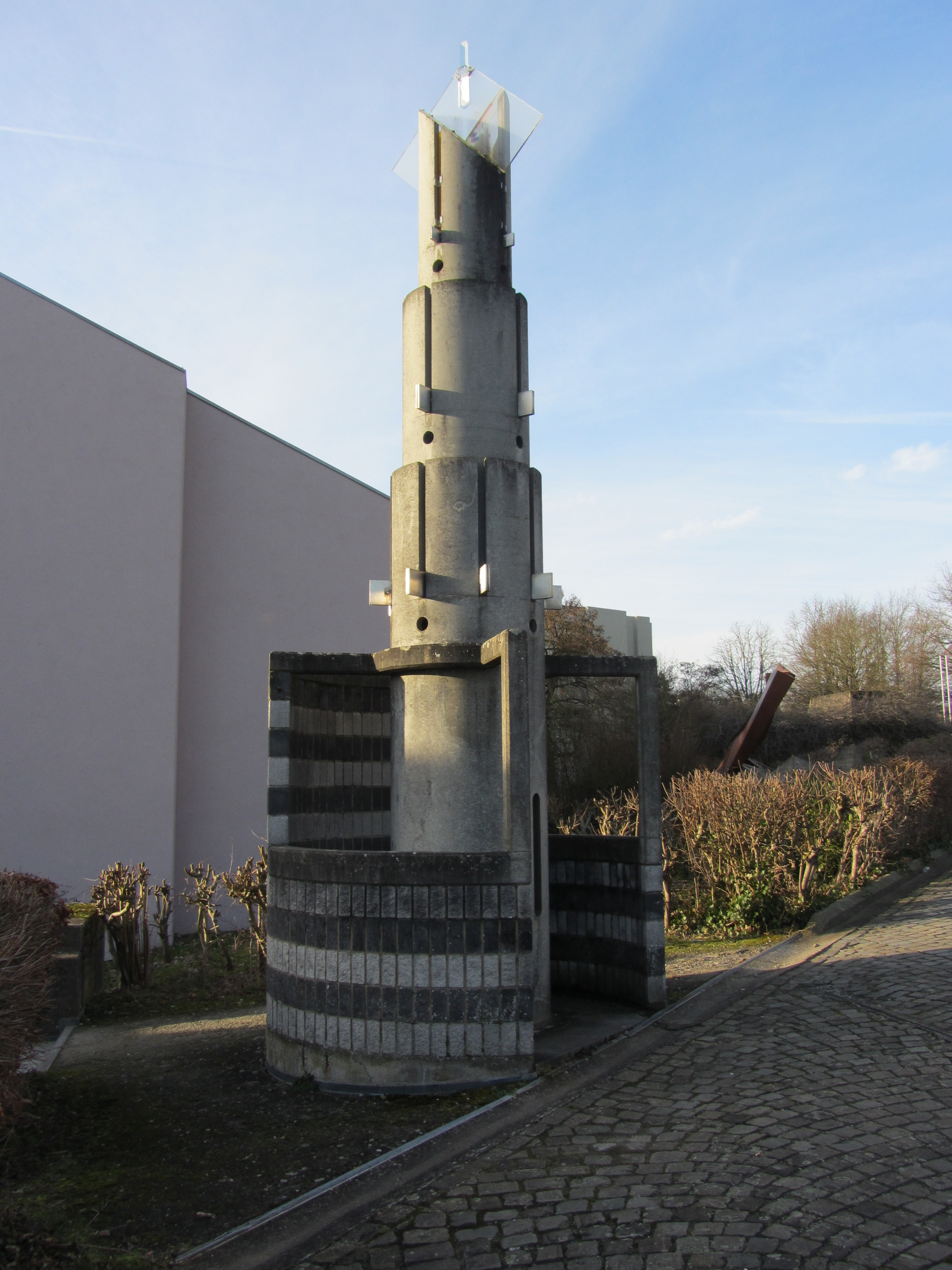 Jean-Paul Laenen - La tour Kaléidoscopique vue extérieure, Musée en plein air du Sart Tilman en Belgique